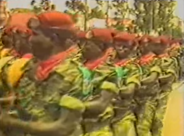 Des soldats de la 31e brigade parachutiste des forces armées zaïroises lors d'un défilé. Extrait du reportage "Mobutu Sese Seko : bâtisseur du Zaïre nouveau", 1985, diffusé via la RTBF